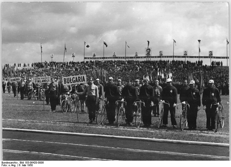 Warschau, Radrennen Warschau-Prag, Eröffnung Das grosse internationale Radrennen des Friedens Warschau-Prag Prag-Warschau Am 28. April 1950, dem 30. Jahrestag der Polnischen Radrenn-Union, starteten die Radrennmannschaften aus allen Teilen der Welt zur frohen Fahrt Warschau-Prag, Prag-Warschau, die zu einer internationalen Demonstration für den Frieden wurde. Eine deutsche Delegation nimmt an dieser Fahrt teil. UBz: Die Mannschaften aus Bulgarien (vorn) Finnland u. Rumänien Aufn.: Illus 6.5.50 8 6420-50-V Leihweise Illus Berlin ws